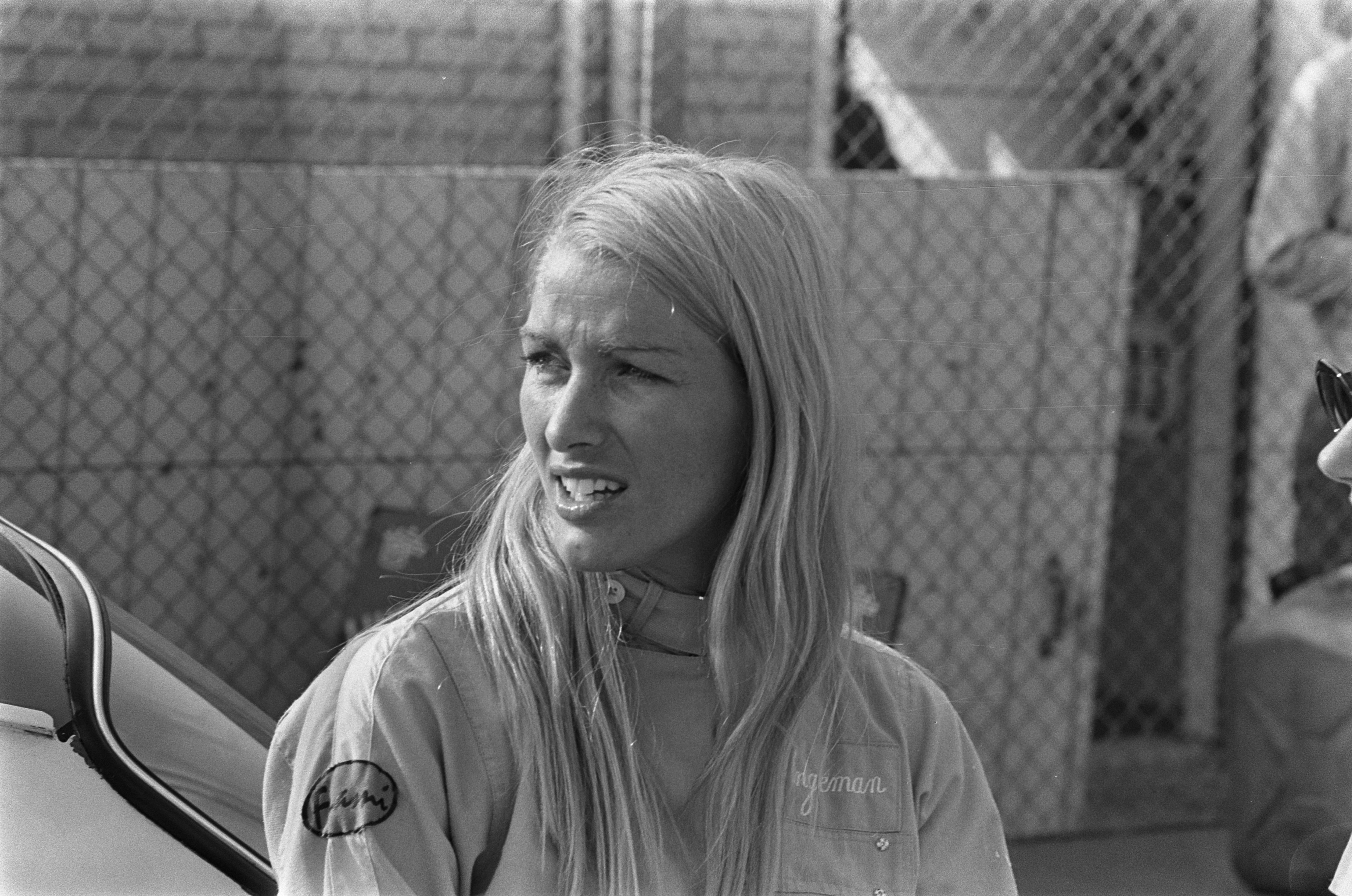 Liane Engeman bij de autoraces op circuit Zandvoort